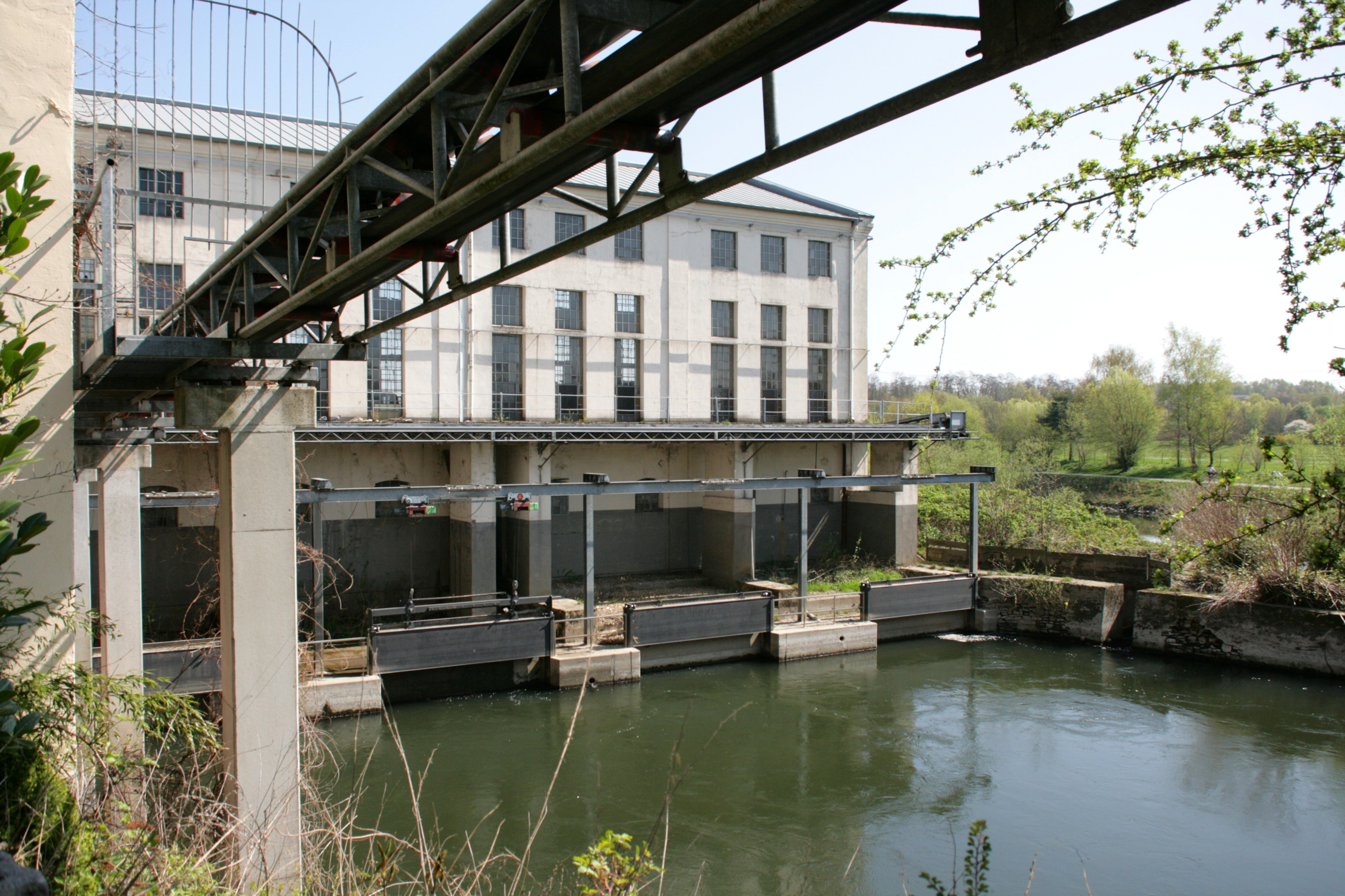 Wasserkraftwerk Hoster Mühle, In der Lake, Essen-Horst